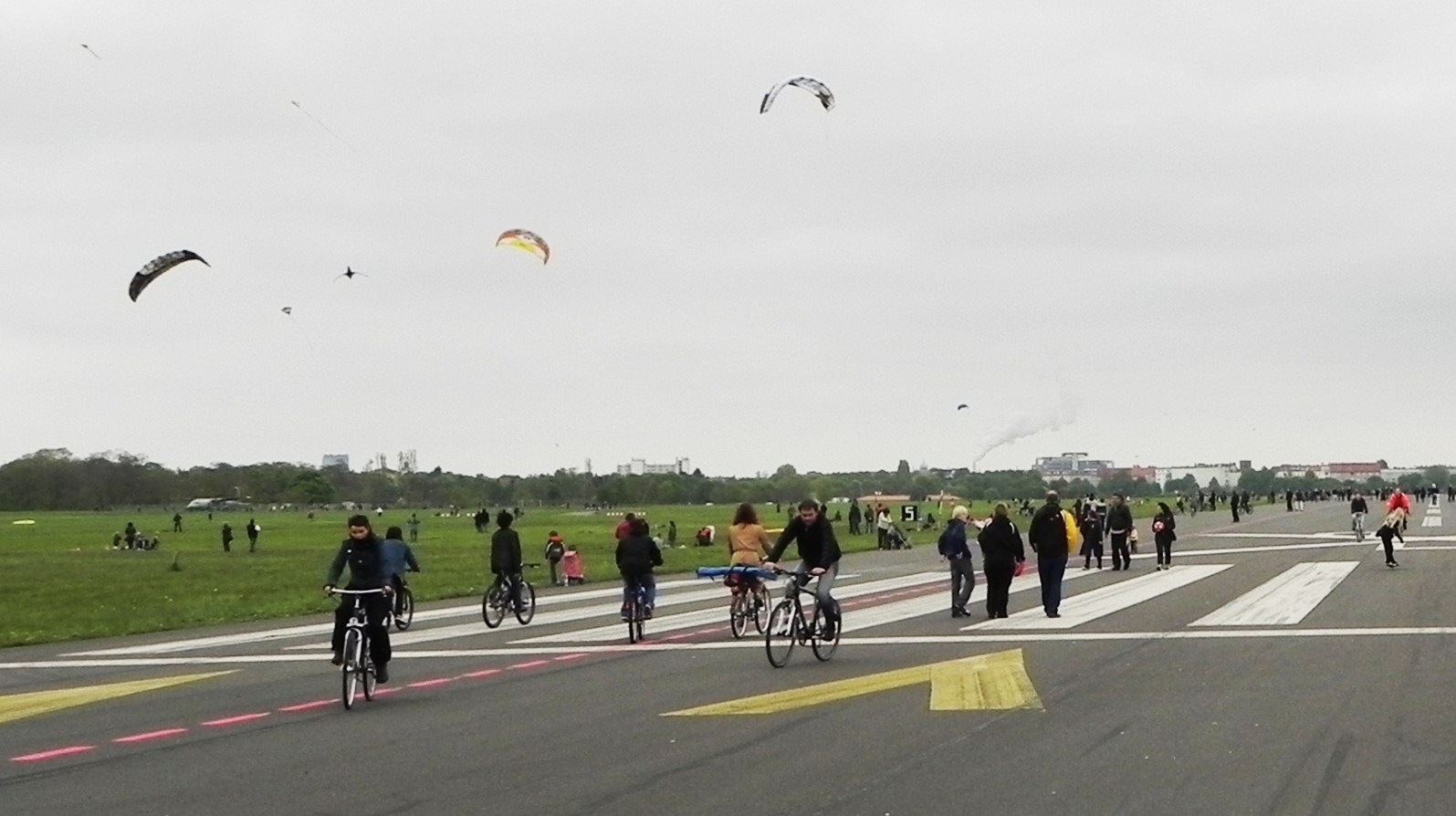 Tempelhofer Park Berlin